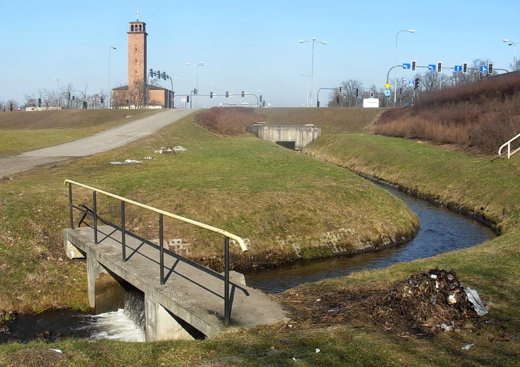 Struga Flis na Czyzkówku w Bydgoszczy